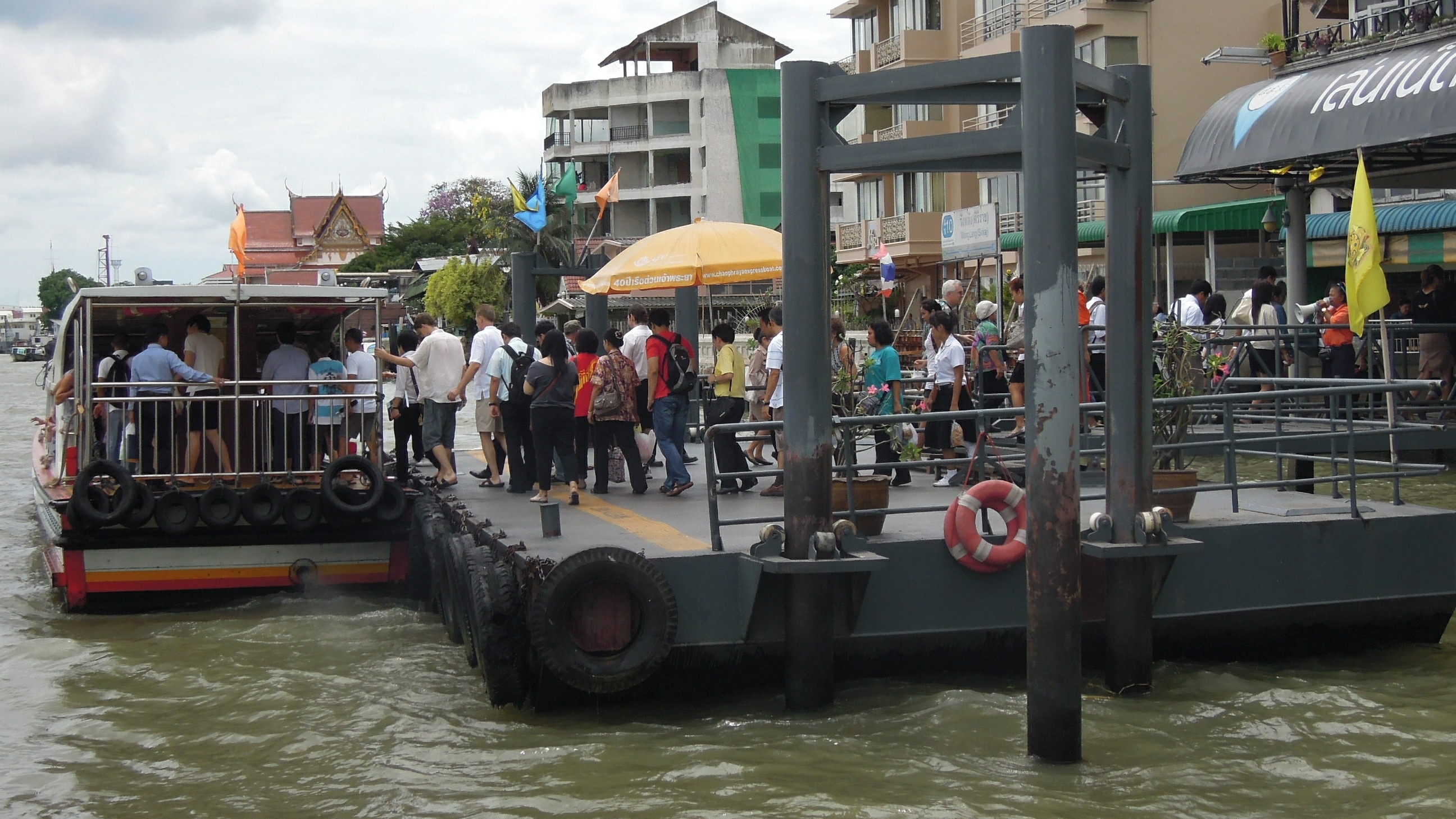 Wang Lang ferry pier on Chao Phraya River, Bangkok Noi district, Bangkok.